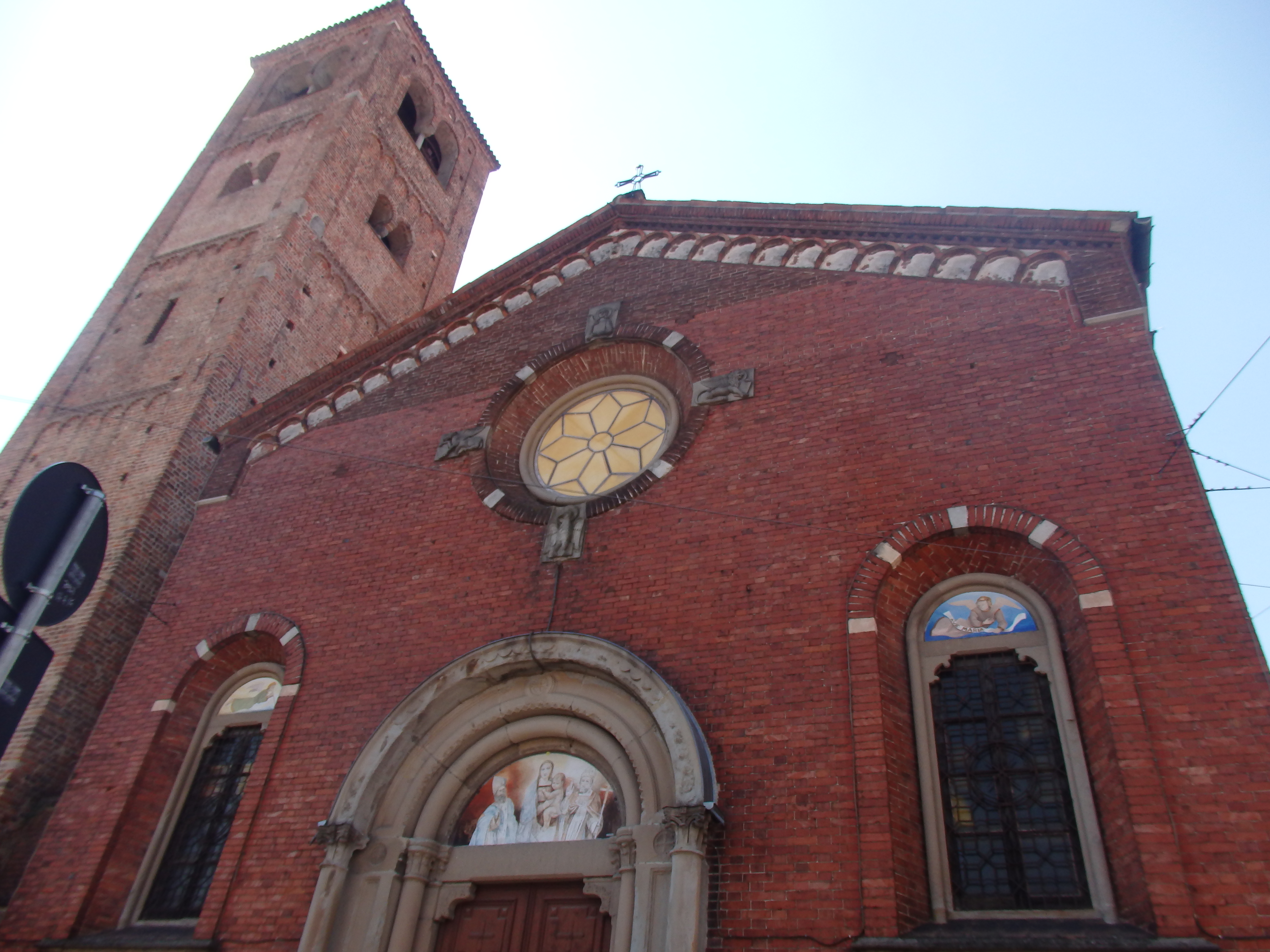 Baggio